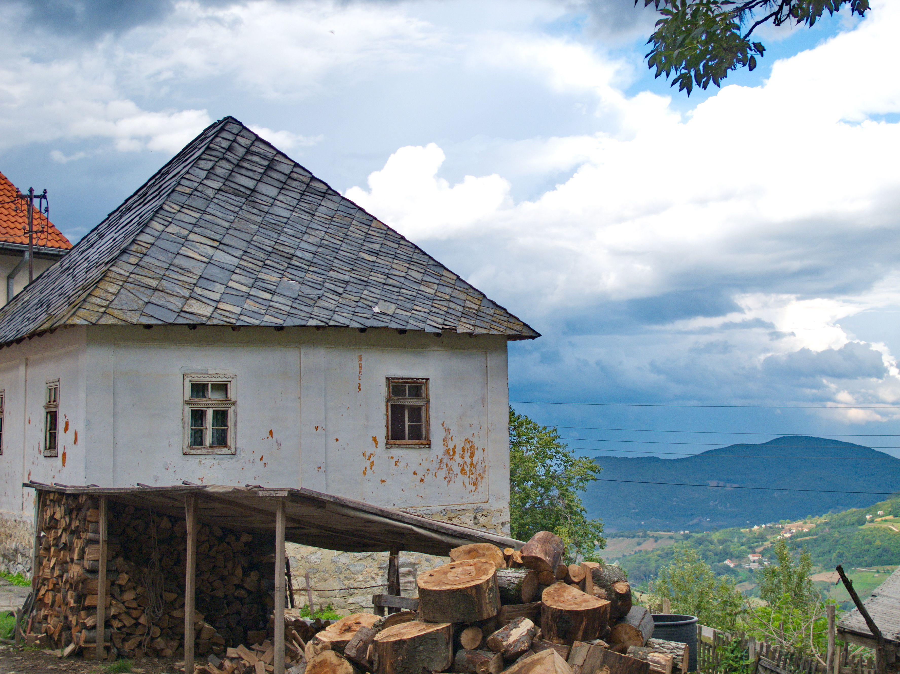 Село Бреково, оштина Ариље.